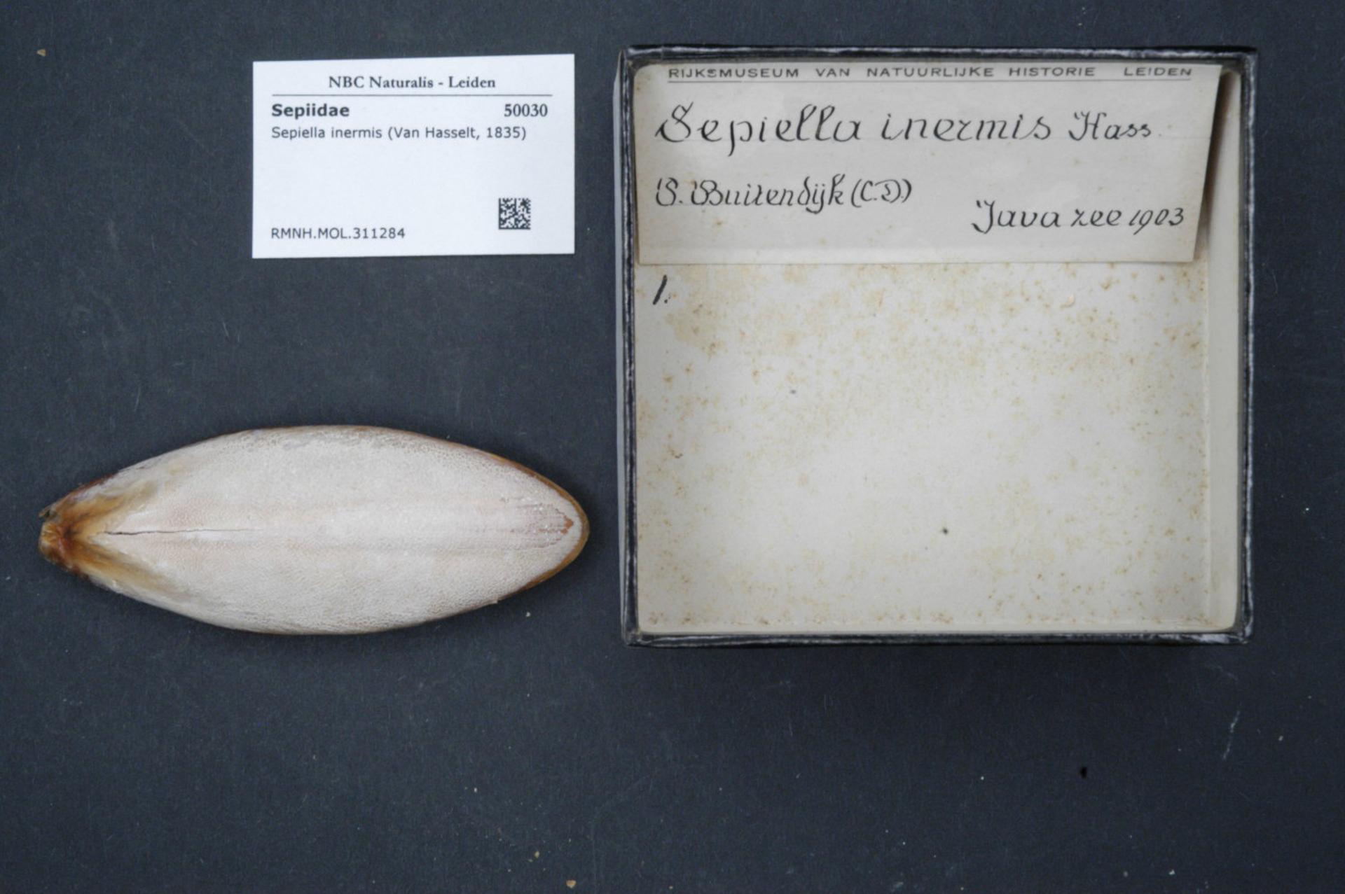 Sepiella inermis (Van Hasselt, 1835)